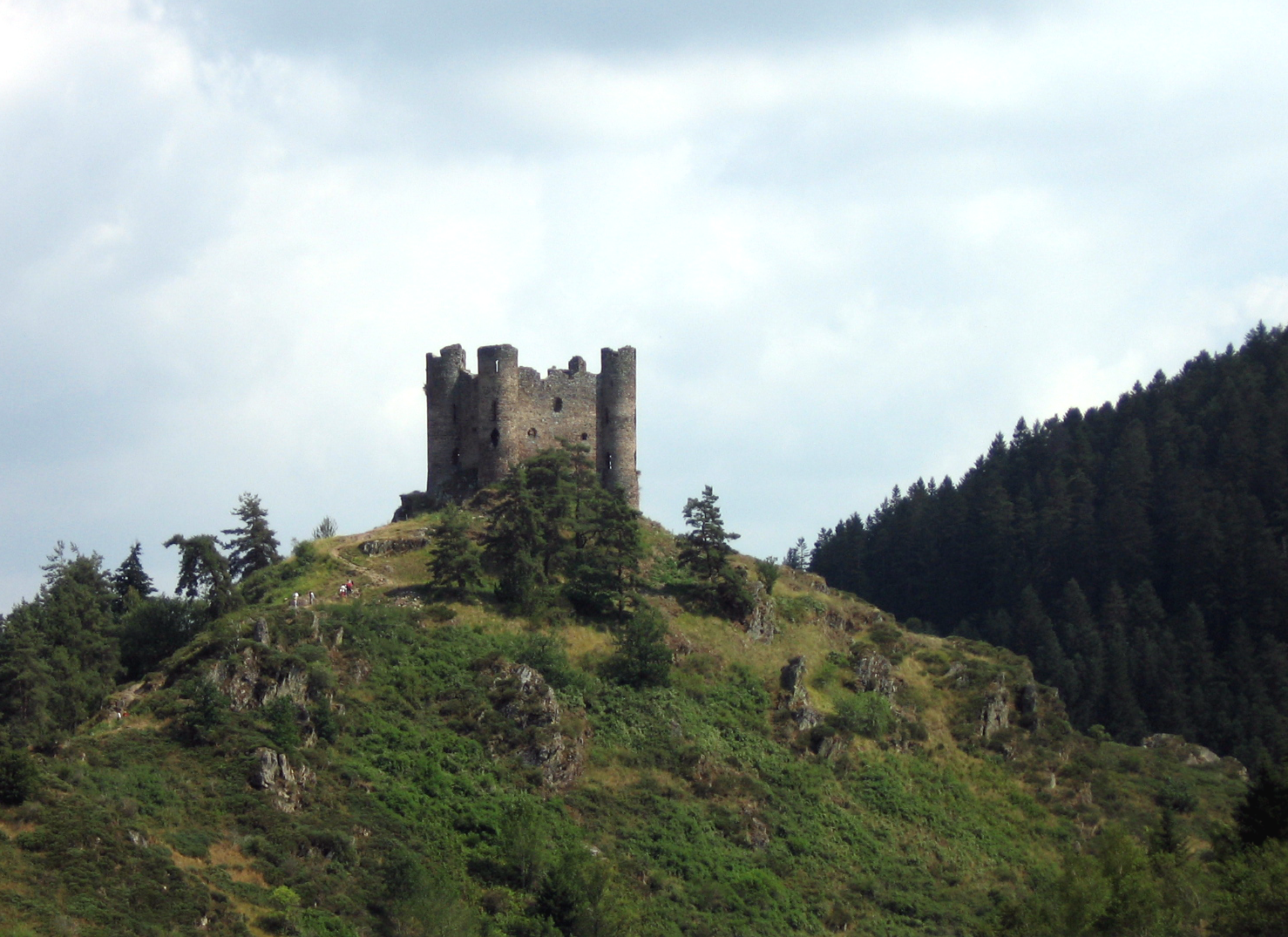 Chateau d'Alleuze (Cantal) ; photographie personnelle mise dans le domaine public.